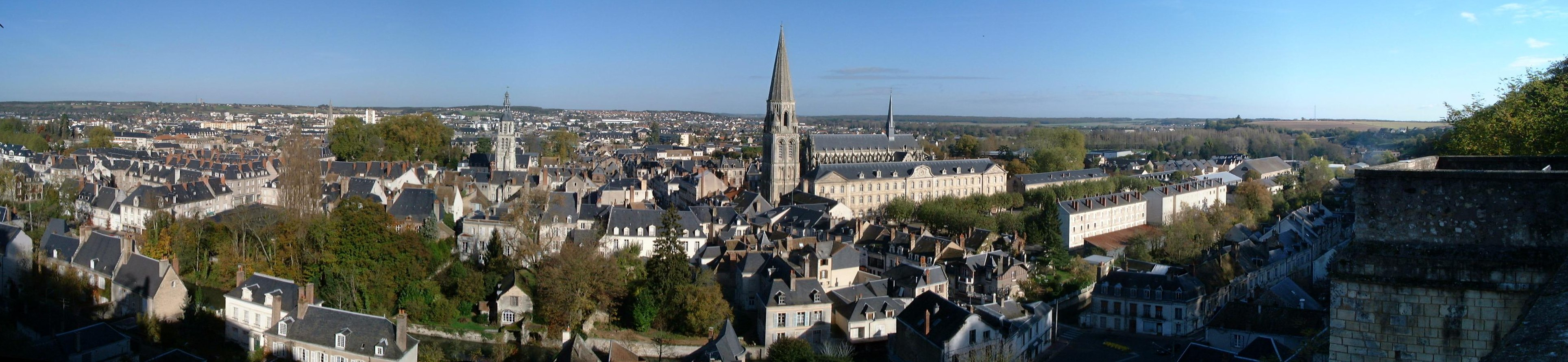 Vue panoramique de la ville de Vendôme (41-France) depuis le Château. Catégorie:Commune de Loir-et-Cher